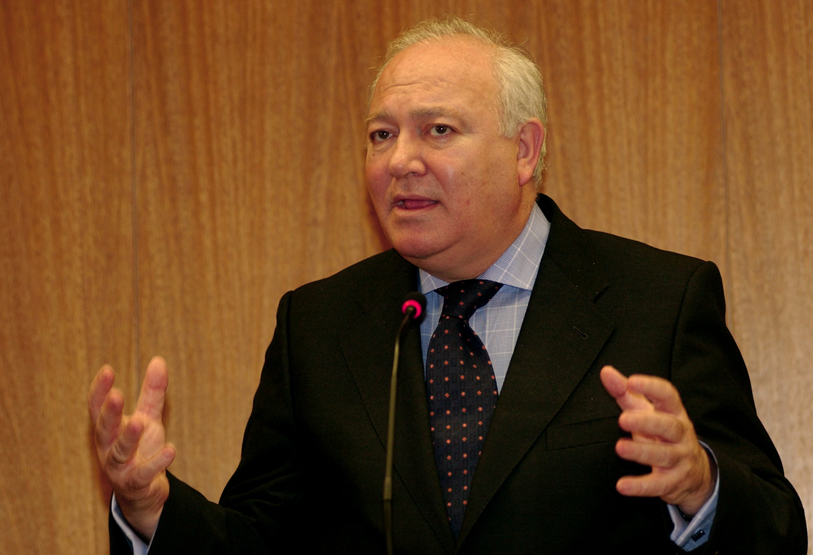 O ministro das relações exteriores da Espanha, Miguel Ángel Moratinos, durante entrevista coletiva no Palácio do Itamaraty (Brasil)